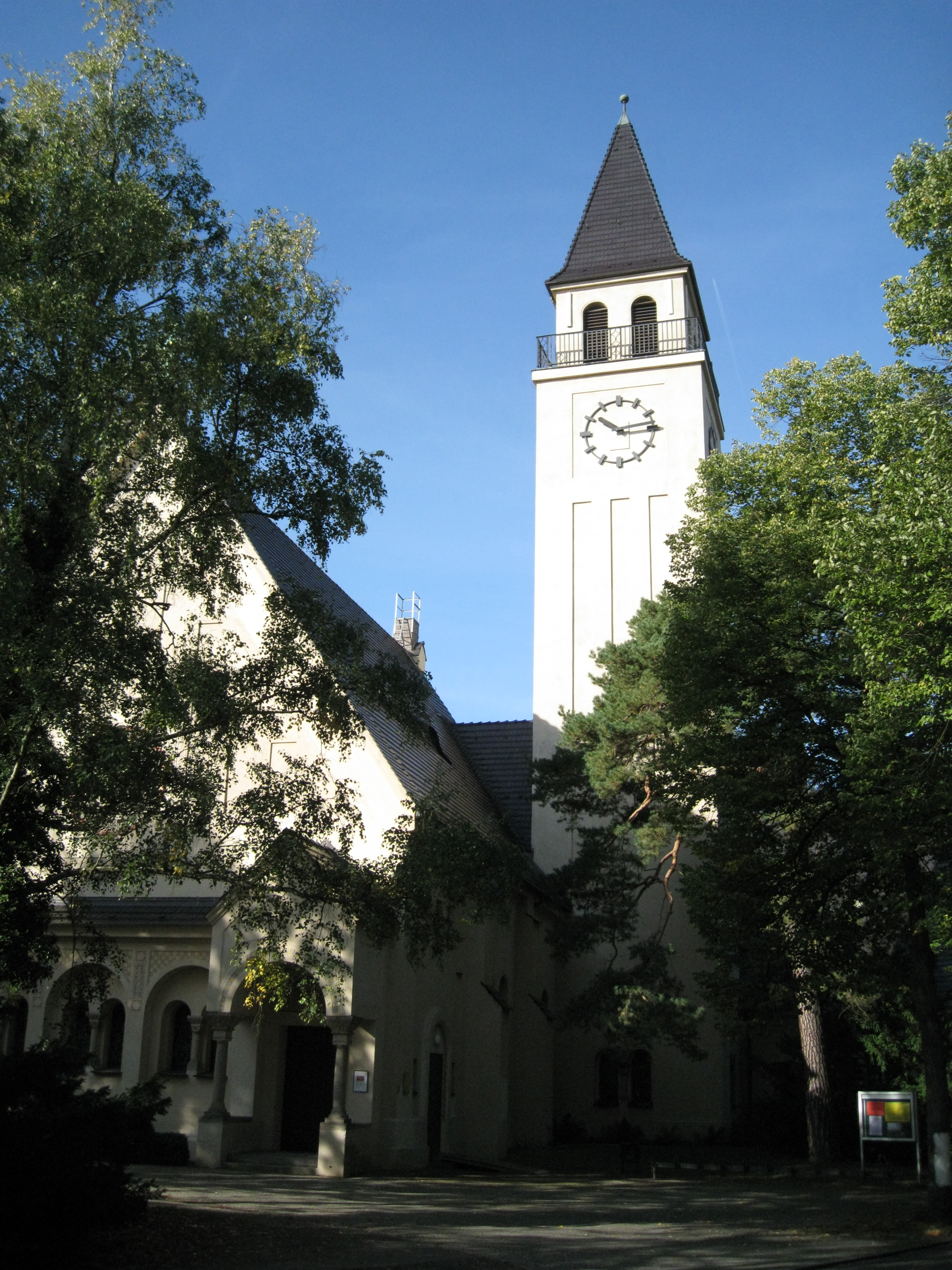 Blick auf den Turm der Johanneskirche Schlachtensee